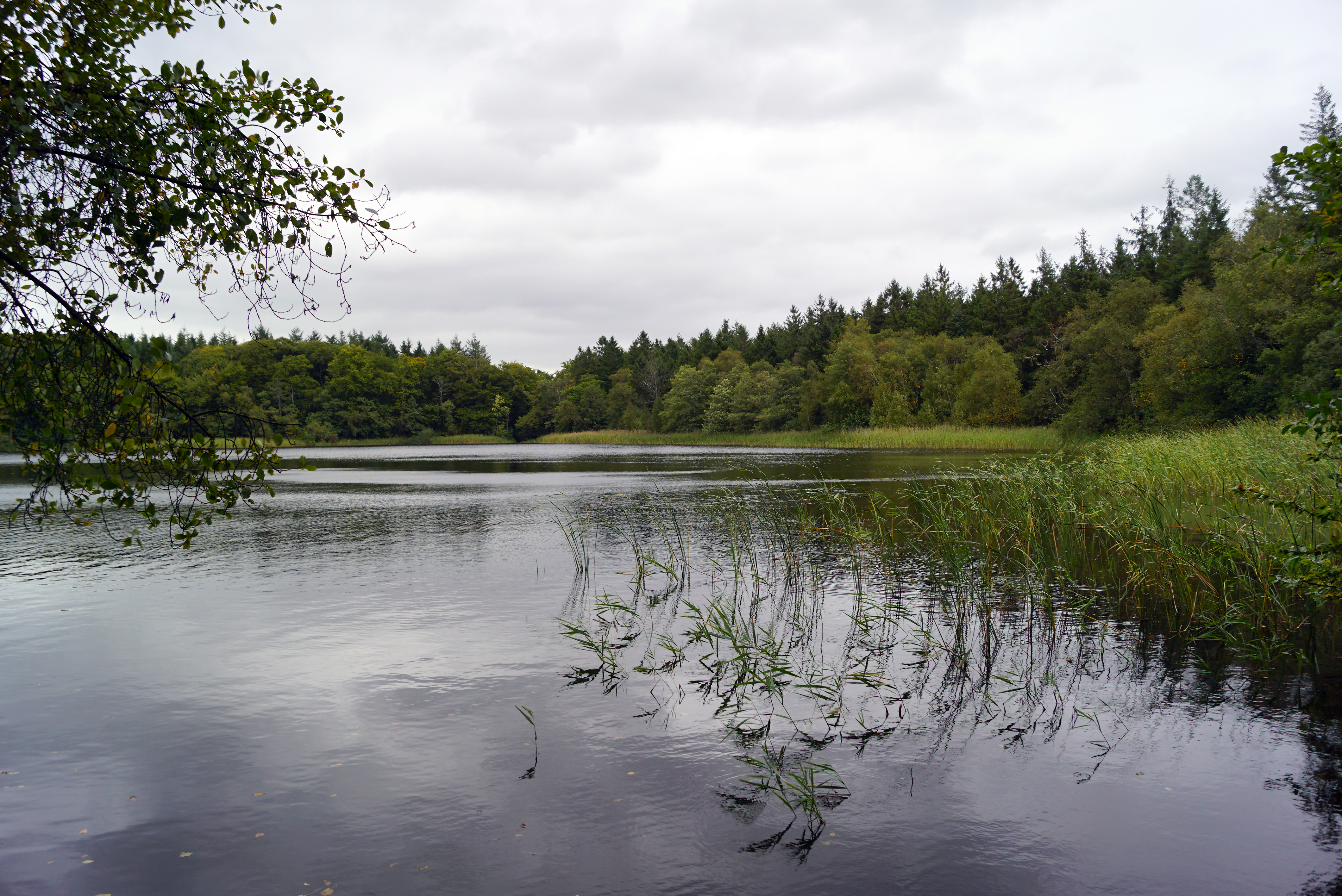 Avnsø set mod nord